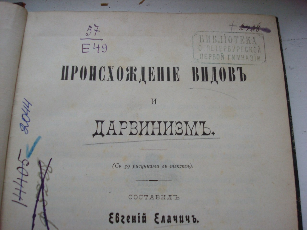 Титульный лист книги Евгения Александровича Елачича «Происхождение видов и Дарвинизм», СПб Типо-литография Шредера 1904г.